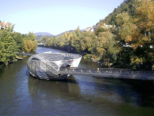 Insel in der Mur (Graz, Austria)